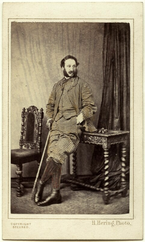 Photograph by Henry Hering